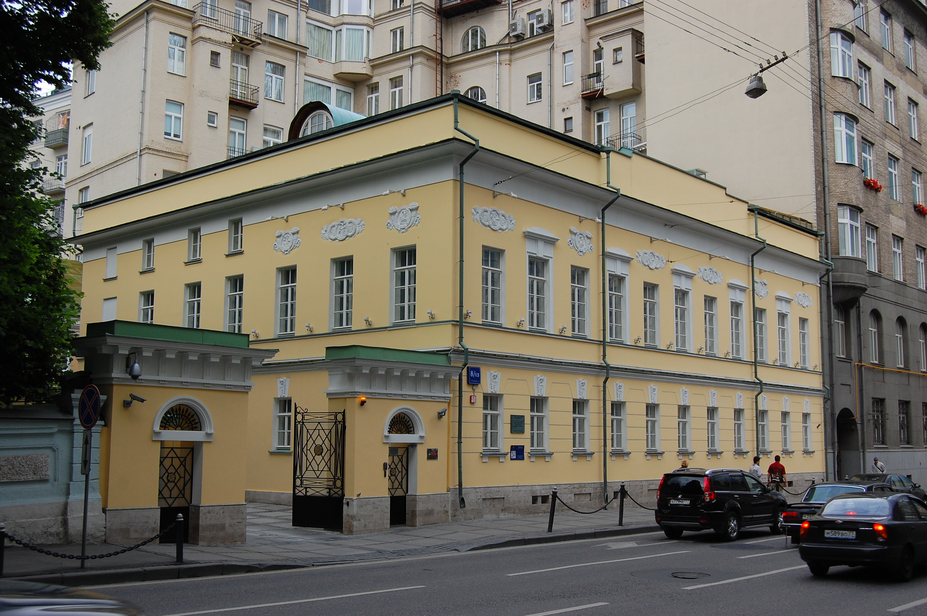 Усадьба М. П. Арбузовой, общий вид